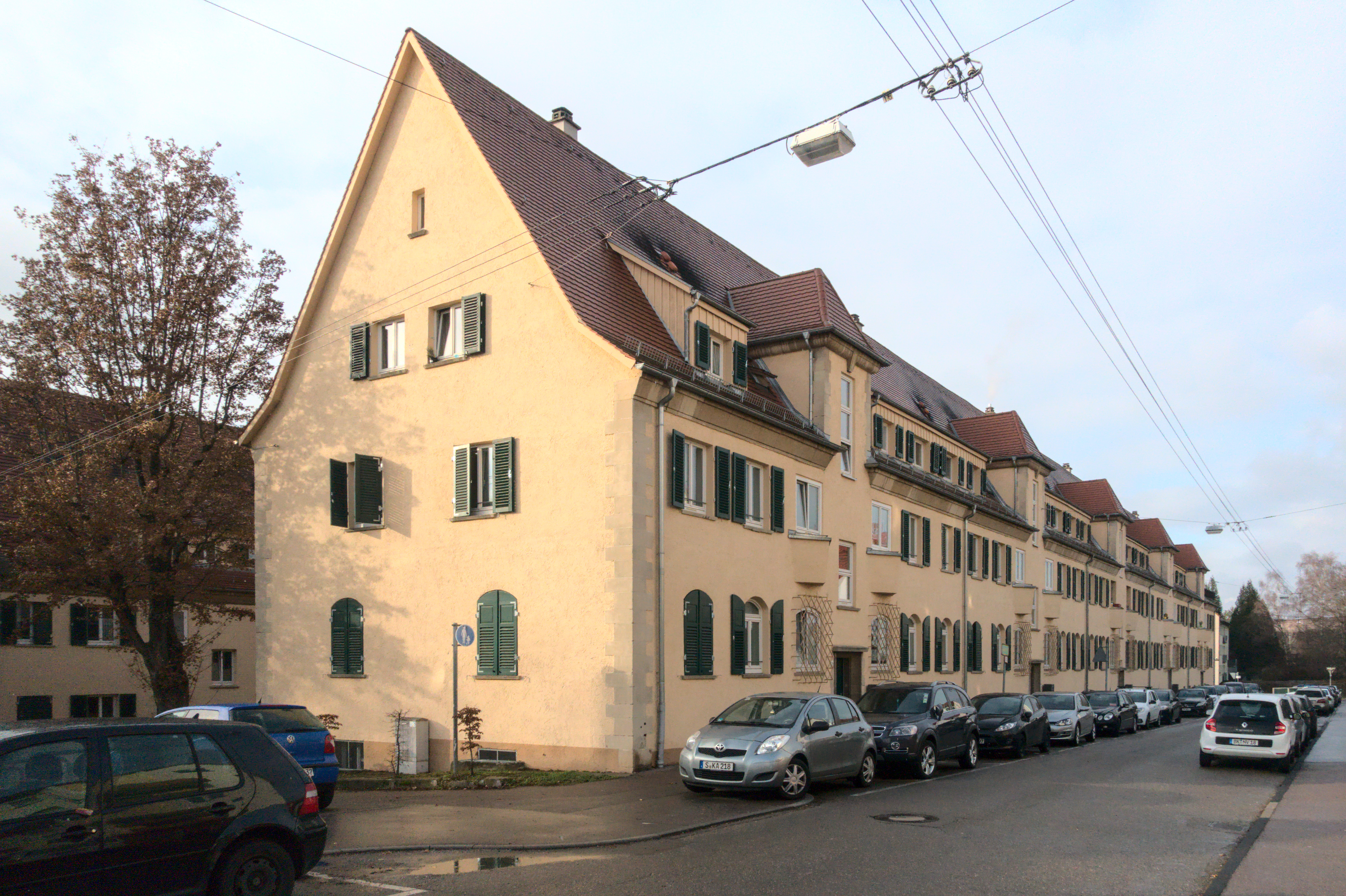 Wallmersiedlung in Stuttgart-Untertürkheim, älterer Teil, Sattelstraße 75 aufwärts